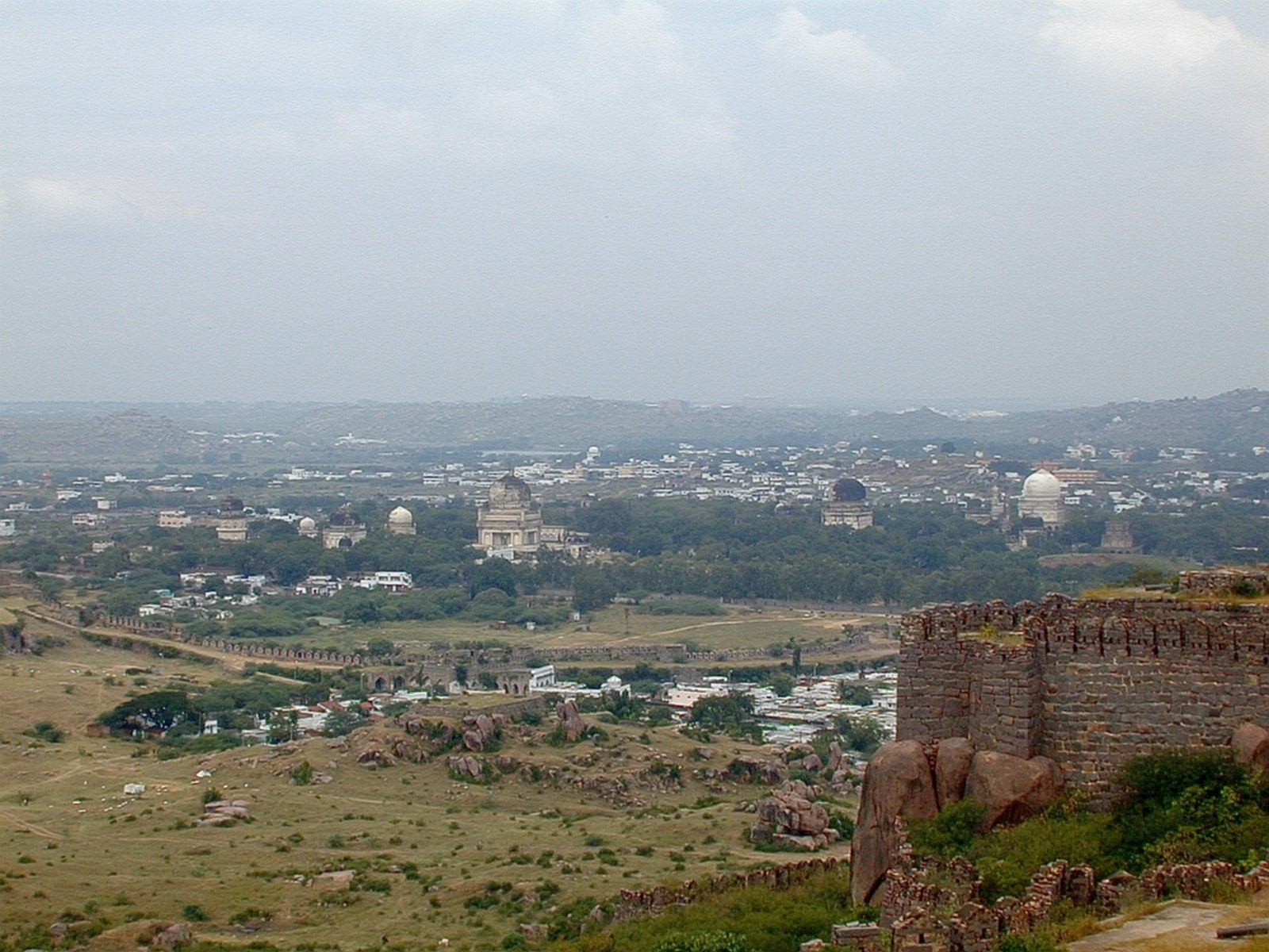 ゴルコンダ要塞からの一望